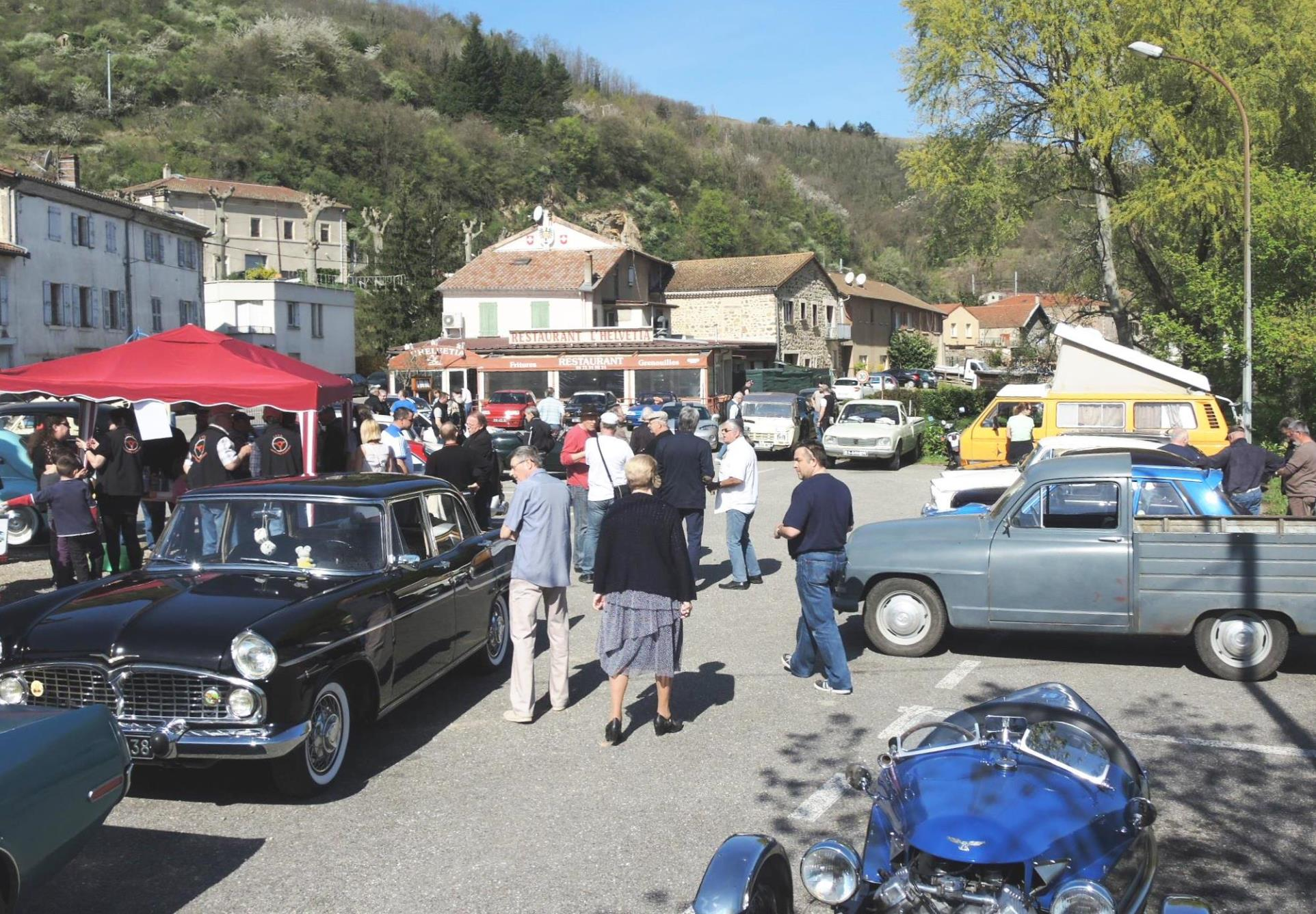 Charnas détail